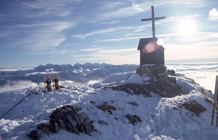 Blick vom Geigelstein auf den Kaiser